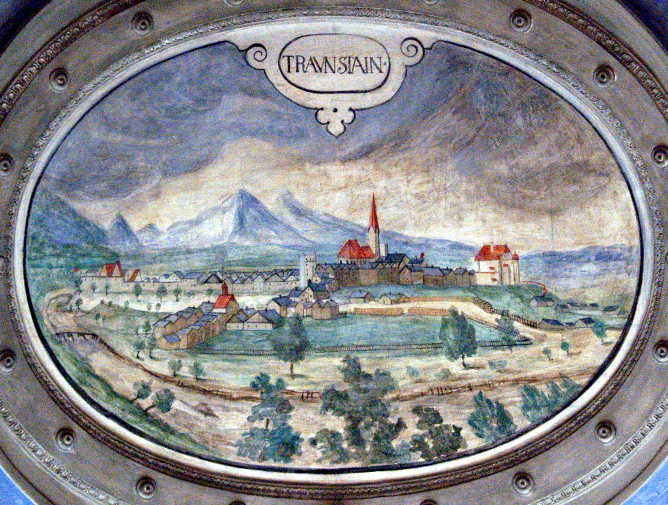 Traunstein ist eine der insgesamt 102 Ansichten von Städten, Märkten, Burgen und Schlössern, die das Gewölbe des Antiquariums der Münchner Residenz zieren.